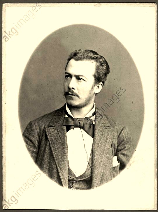 Porträtaufnahme des Schauspielers, Regisseurs und Dramaturgs Theodor Köstlin, alias Theodor Brandt